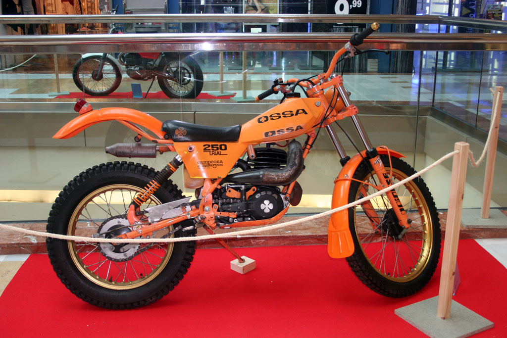 Ossa TR 250 orange 1982